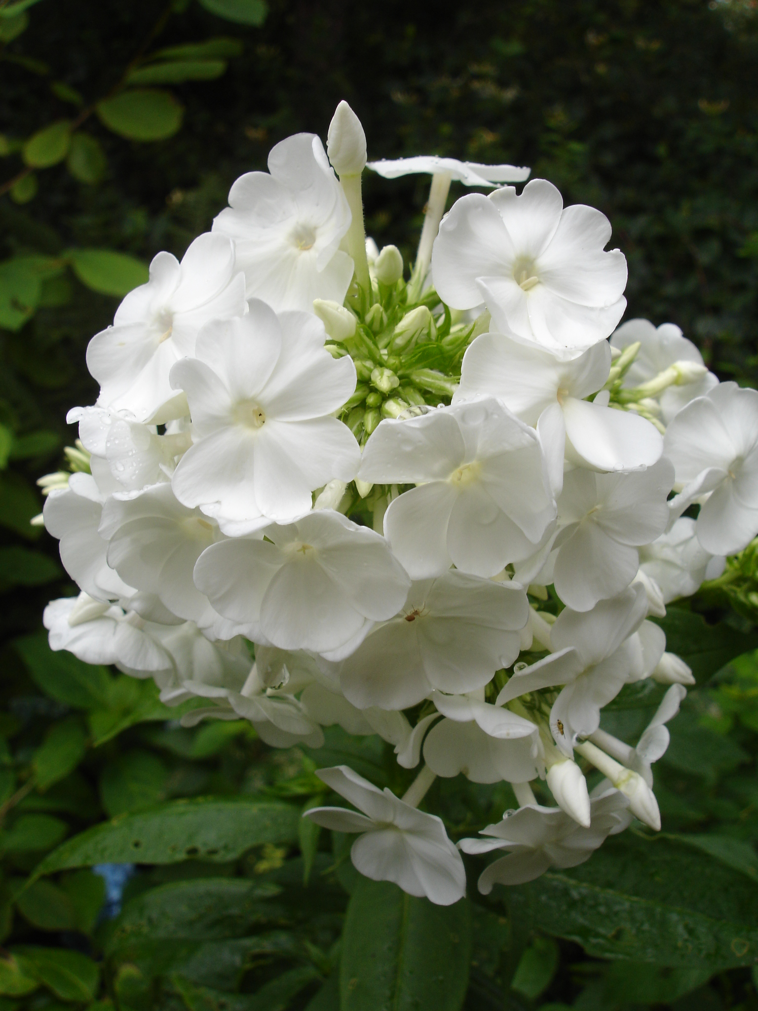 Phlox paniculata 'David'